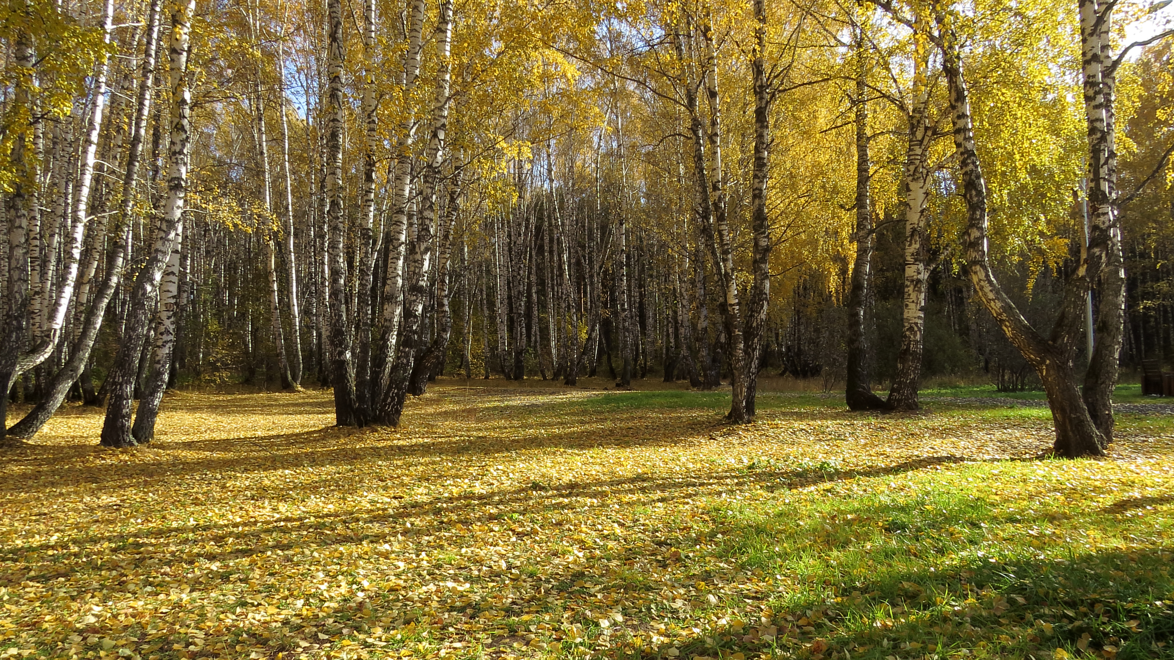 Гилевская роща: Тюмень, Тюменская область This image is related to the protected area of Russia number 7230137